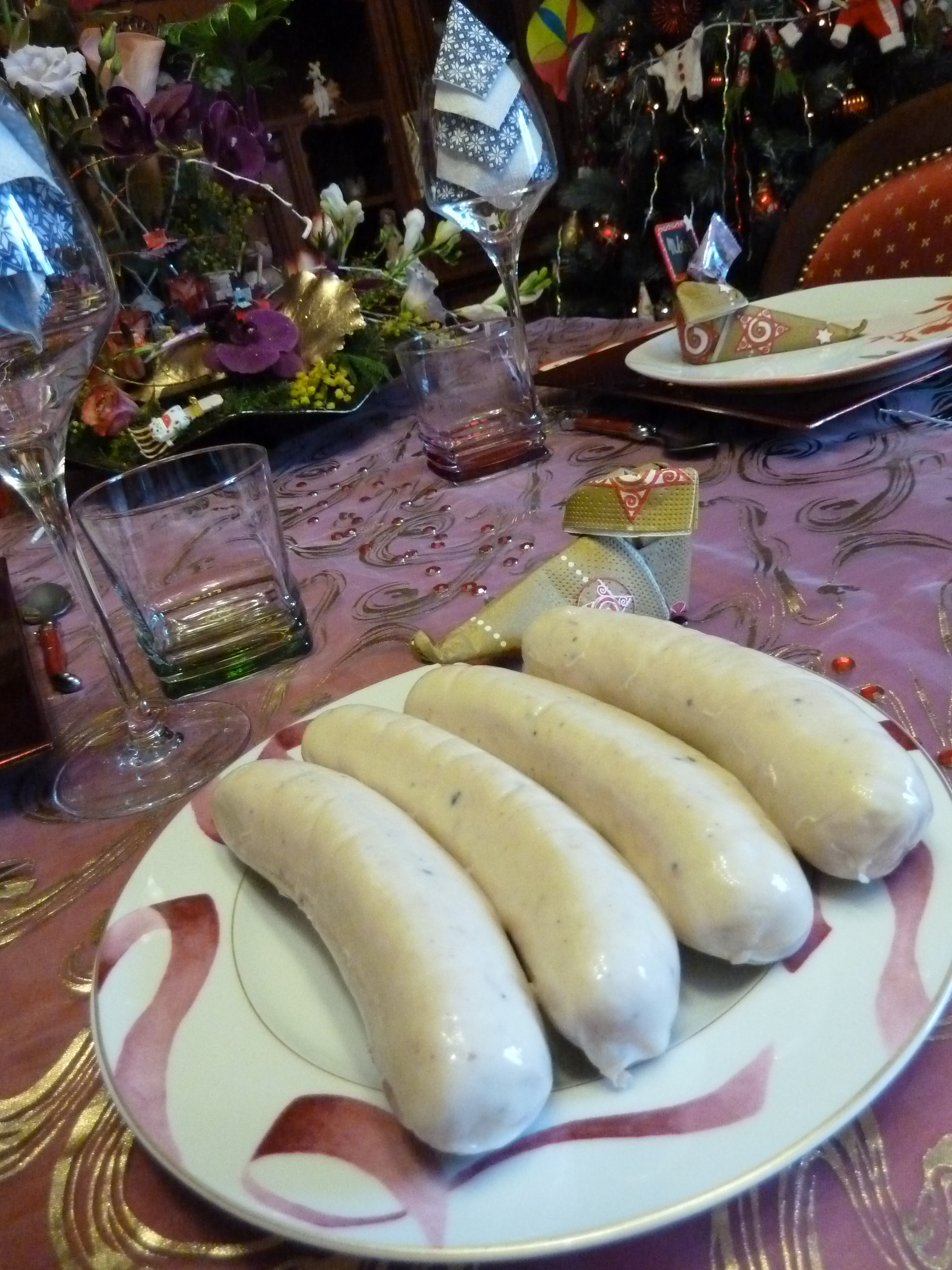 Boudin blanc de Rethel aux truffes